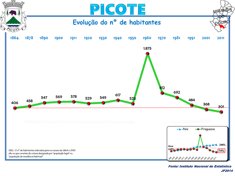 Evolução da População 1864 / 2011